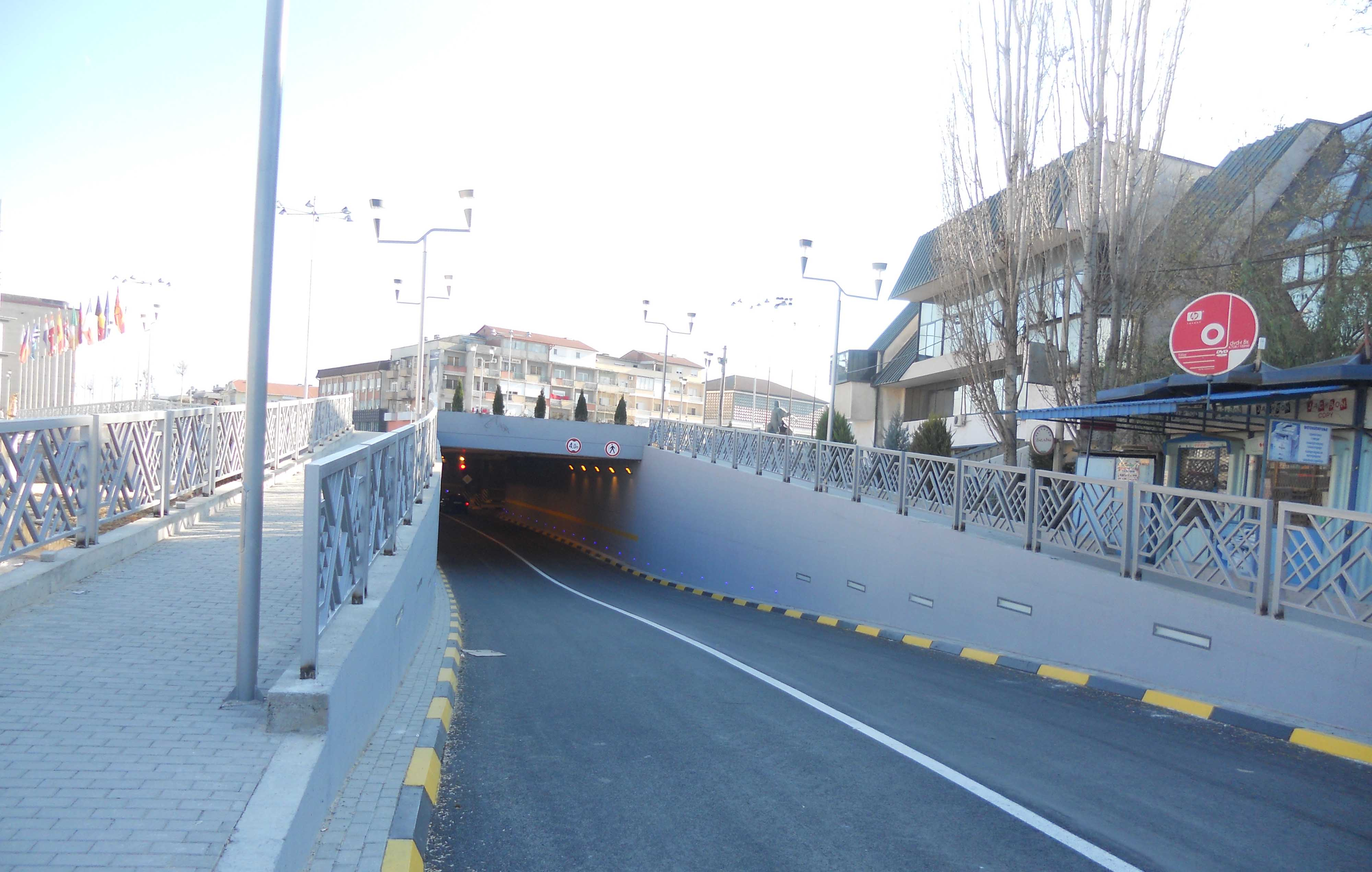 Подземен премин во Струмица